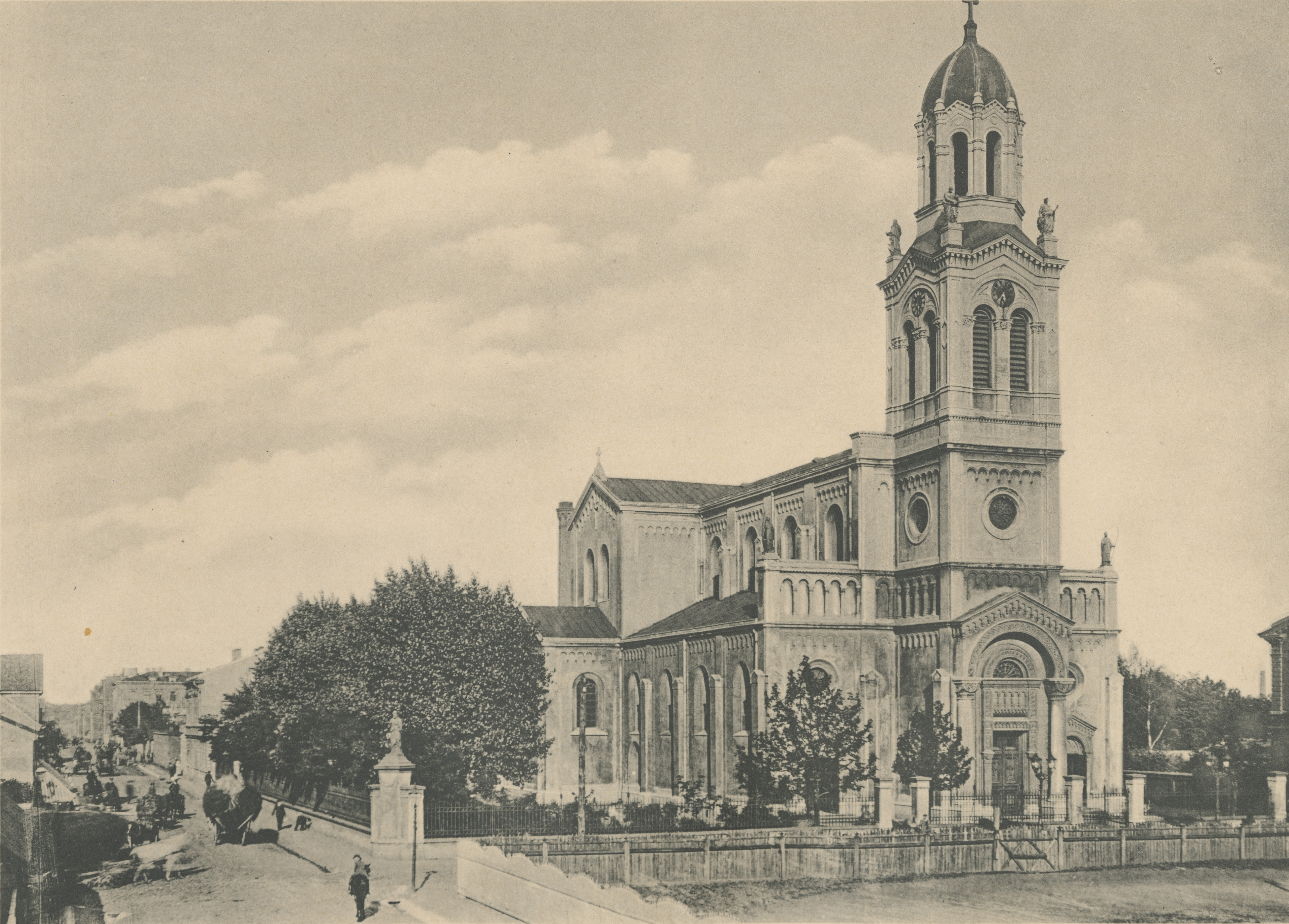 Fotografia Bronisława Wilkoszewskiego z albumu „Widoki m. Łodzi” z roku 1896 przedstawiająca od strony frontowej kościół rzymskokatolicki pw. Podwyższenia Świętego Krzyża. Kościół pierwotnie konsekrowany w 1875 roku jako kościół pw. św. Jakóba, znajdujący się u zbiegu ulic Dzikiej (ob. Sienkiewicza) i Przejazd (ob. Tuwima). Zaprojektowany w 1860 roku przez warszawskiego architekta Franciszka Tournelle’a kościół ten był odpowiedzią na potrzeby dynamicznie rozrastającego się miasta przemysłowego, jakim była Łódź w drugiej połowie XIX wieku. Pojawiła się wtedy konieczność utworzenia drugiej parafii dla mieszkańców wyznania rzymskokatolickiego. Rok po powstaniu koncepcji architektonicznej przystąpiono do budowy świątyni. Jednak „kryzys bawełniany”, wybuch Powstania Styczniowego i zesłanie proboszcza łódzkiego ks. Wojciecha Jakubowskiego w głąb carskiej Rosji wstrzymały prace. Prace budowlane wznowione zostały w 1871 roku. W 1875 roku nowy kościół został oddany do użytku wiernym. 25 stycznia 1885 roku warszawski abp Wincenty Chościak-Popiel erygował parafię pw. Podwyższenia św. Krzyża, mimo niezakończonych jeszcze prac wykończeniowych. Konsekracji świątyni dokonał 19 maja 1888 roku również abp Chościak-Popiel. Jak w przypadku innych świątyń w Łodzi powstających w tym okresie znaczny udział w jej finansowaniu mieli lokalni najzamożniejsi fabrykanci. Rodzina Scheiblerów ufundowała m.in. ołtarz główny w kościele, ambonę i organy, a Edward Herbst ufundował ołtarz boczny z obrazem św. Justyna.